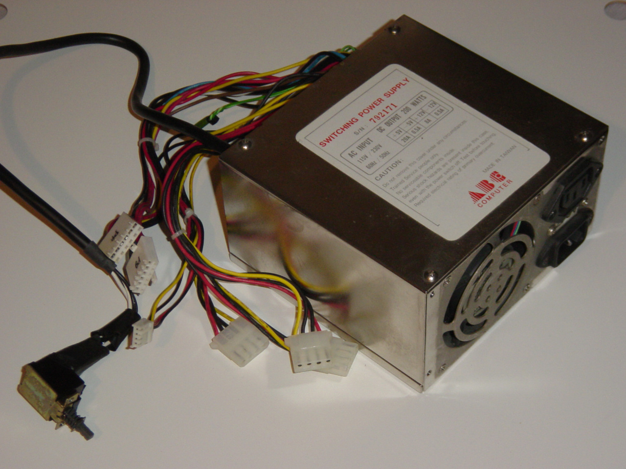 PC-Netzteil für AT-Systeme